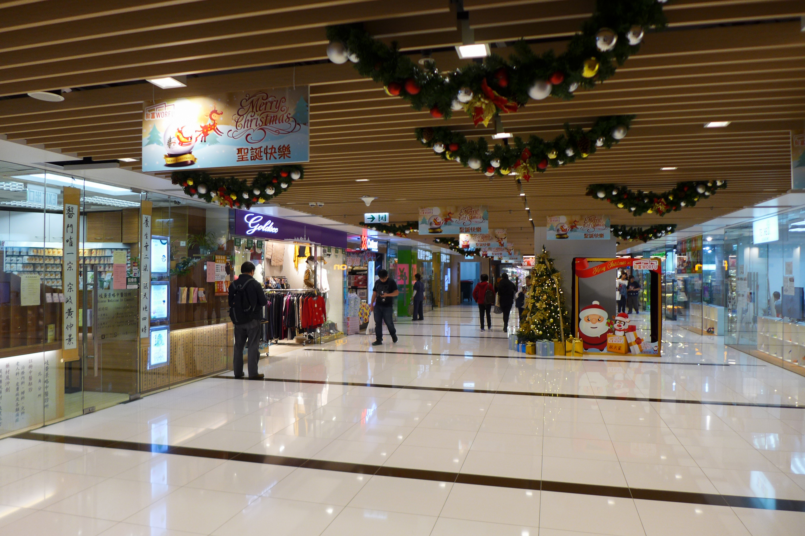 Worfu Arcade Basement